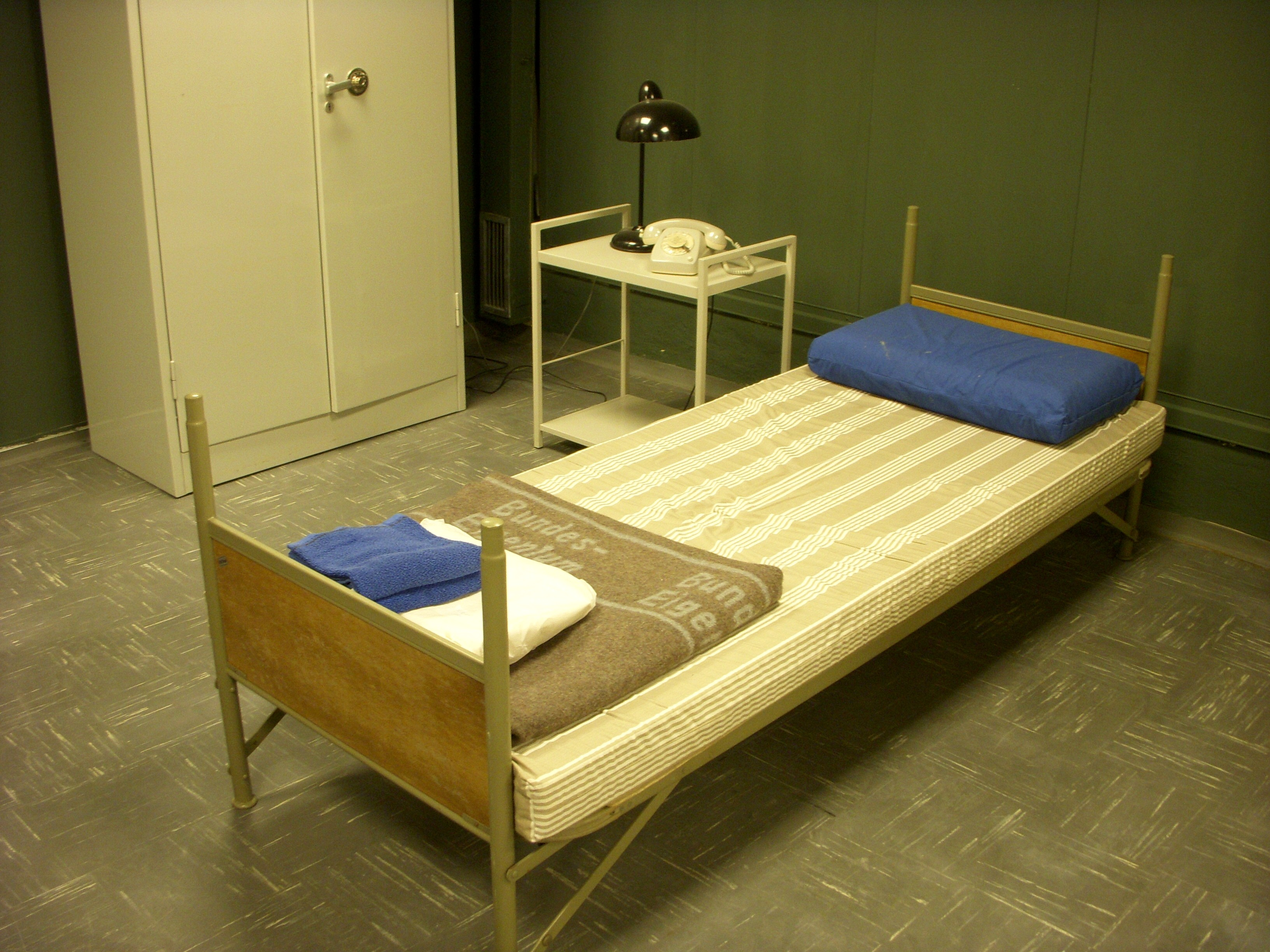 Der Regierungsbunker im Ahrtal, Zimmer des Bundeskanzlers